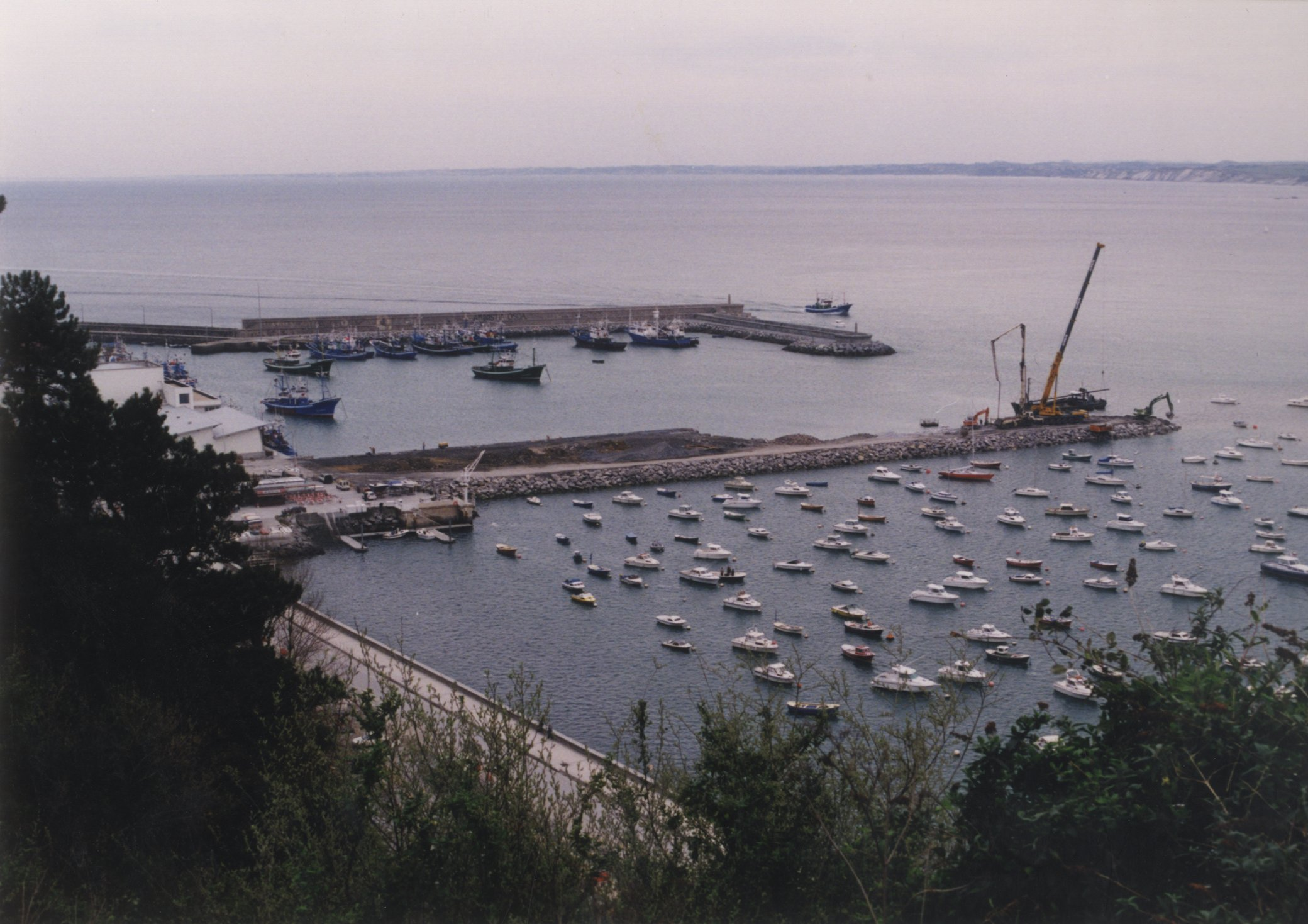 Hondarribiko portua